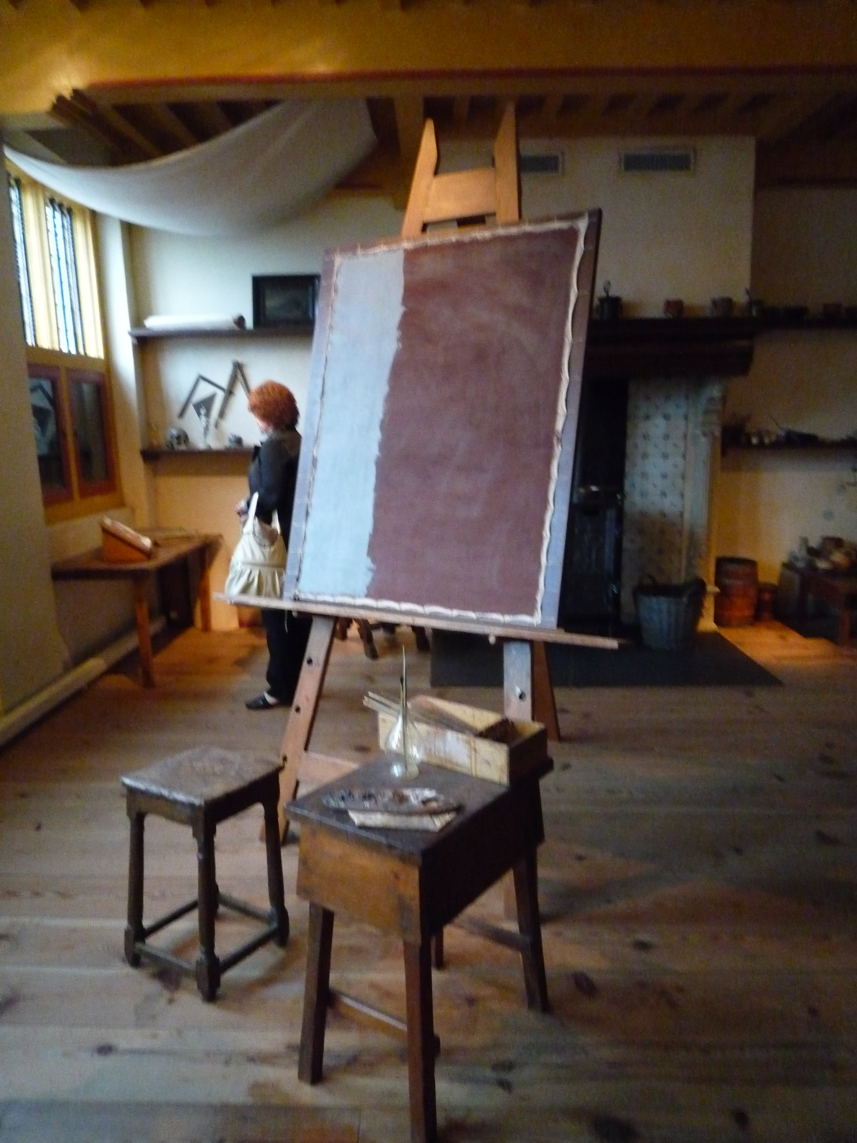 Рабочий кабинет Ремранта